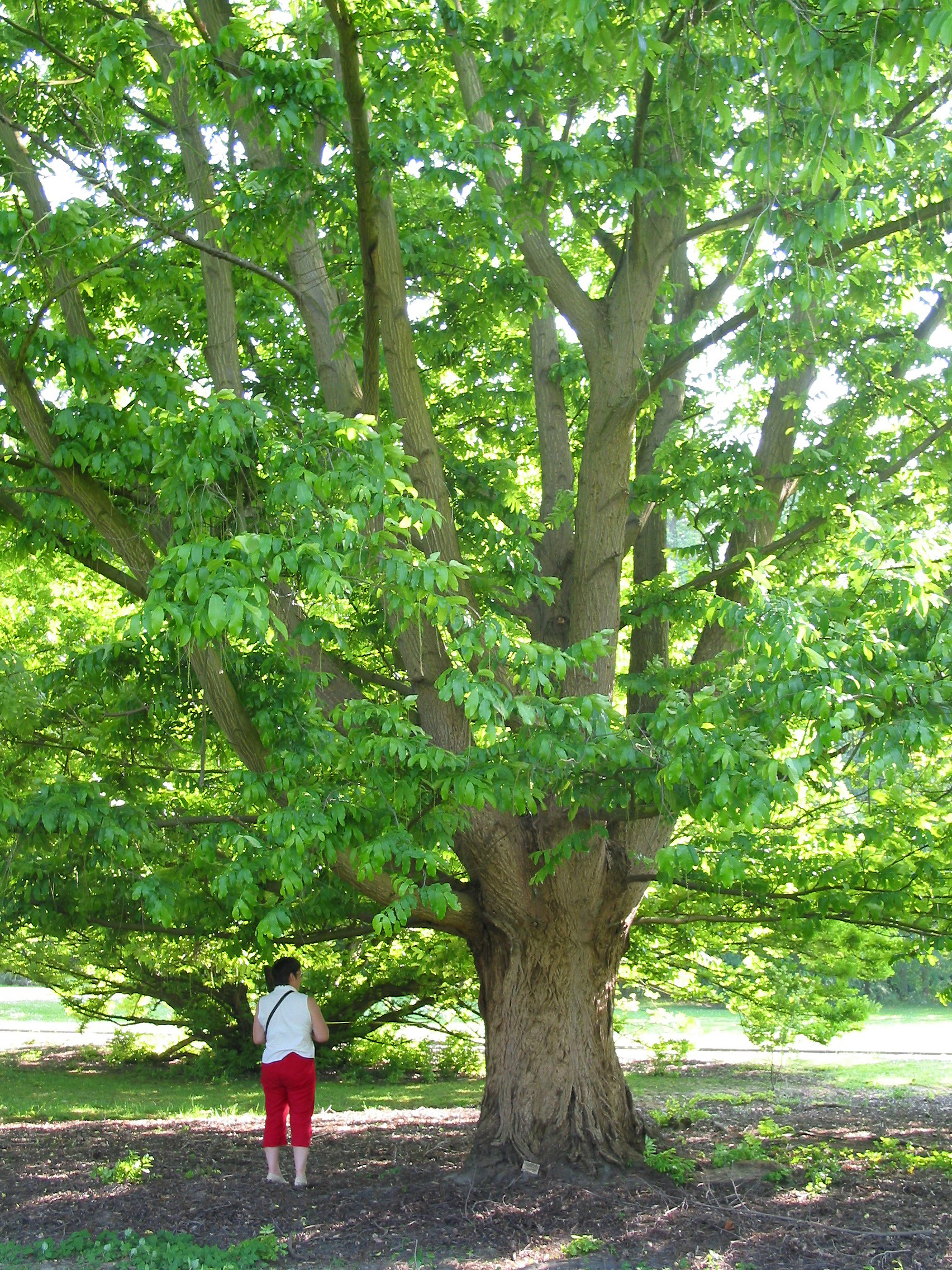 Pterocarya ×rehderiana Circonférence mesurée à 1m50 du sol: 318 cm - (2007) Position exacte : Meise (Belgique) – Parc National Botanique de Belgique.